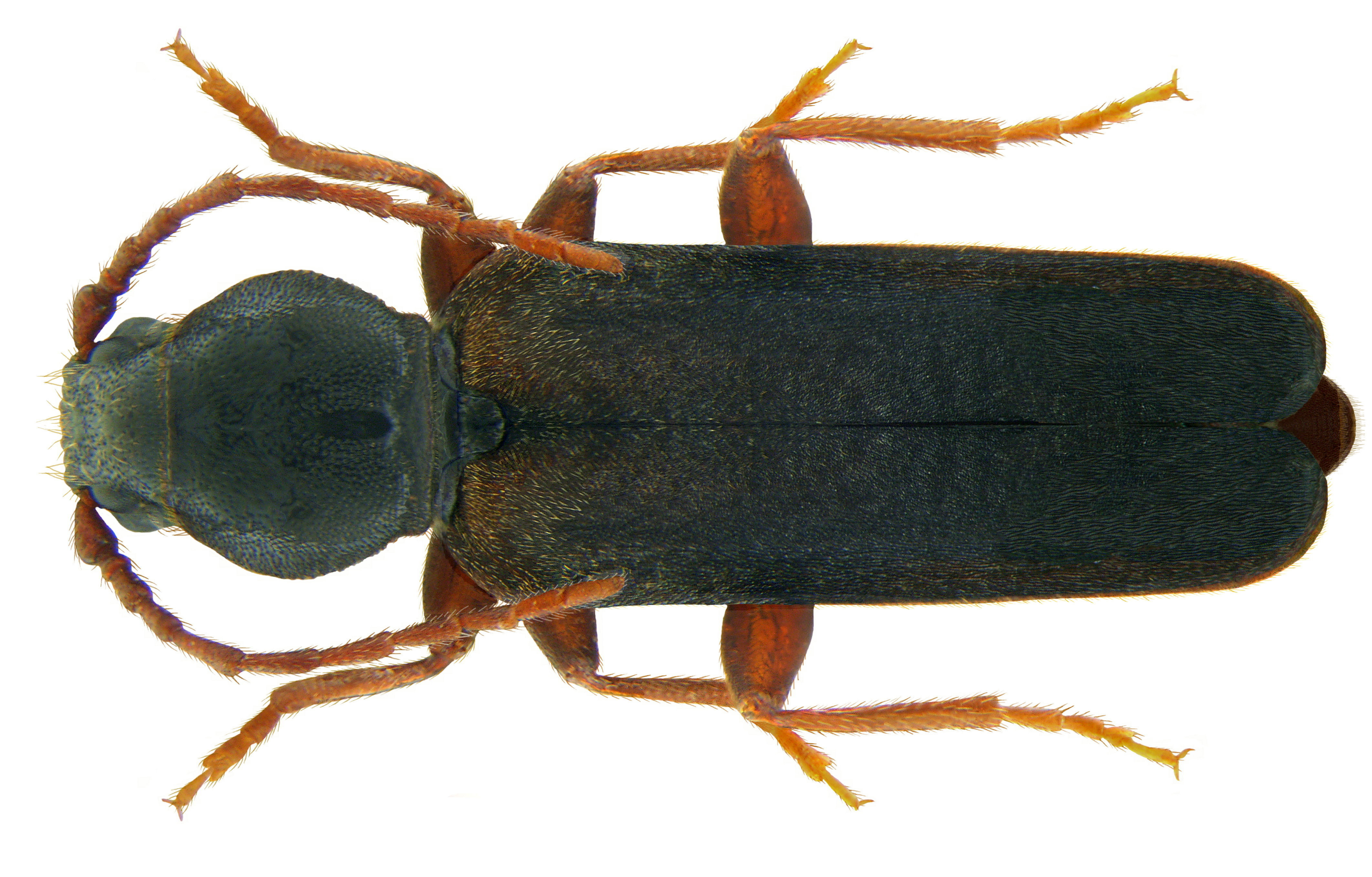 Familie: Cerambycidae Groesse: 8-17 mm Verbreitung: Europa Ökologie: Entwicklung in Lärchenholz Fundort: Germania, Bayern, Oberfranken, Marktleuthen leg. U.Eitschberger, 2003; det. U.Schmidt, 2003 Photo: U.Schmidt, 2009